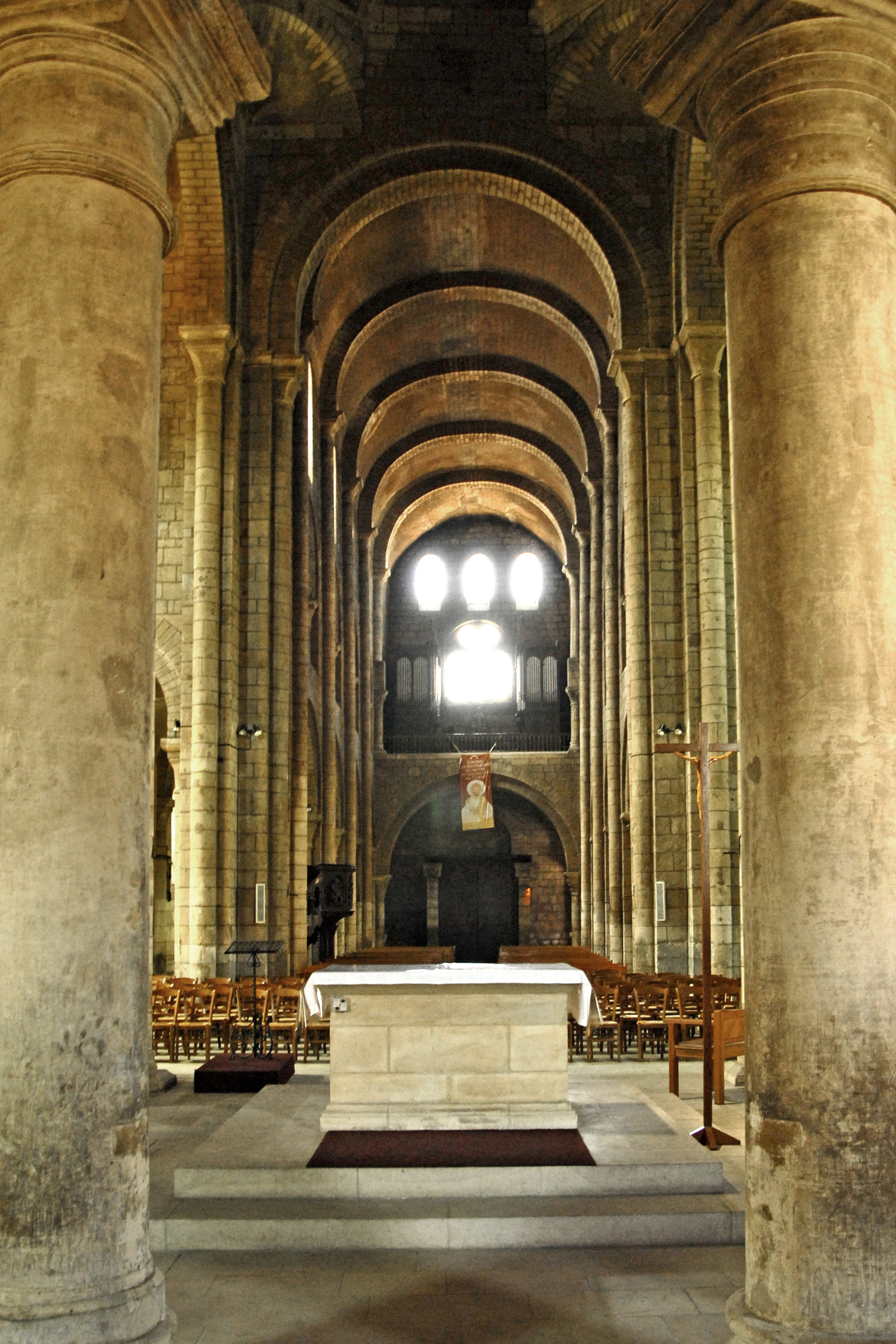 St.-Etienne Nevers, Aus Chor in Mittelschiff, Empore in Joch 1